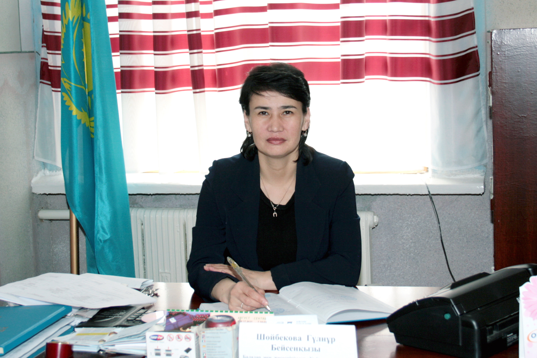 Шойбекова Гульнур Бейсеновна